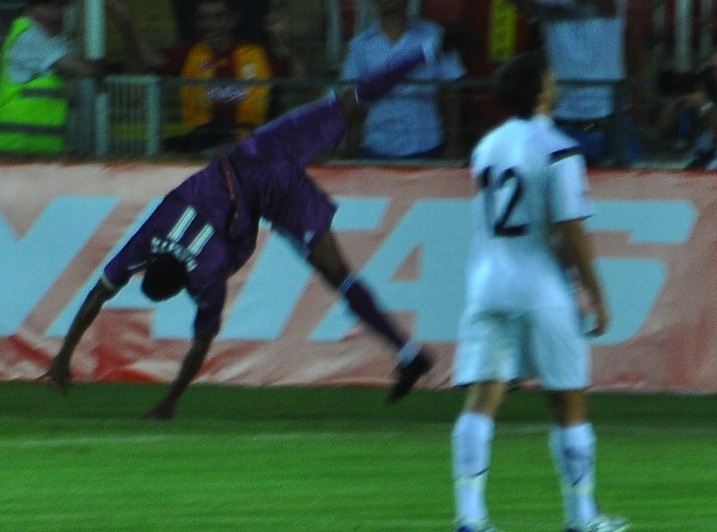 Keita gol sonrası takla atarken